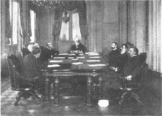 El Presidente de Argentina Manuel Quintana, y su primera reunión de Gabinete de Ministros, luego de asumir.